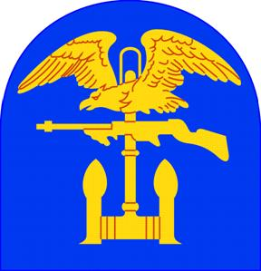 1st Engineer Brigade shoulder sleeve insignia